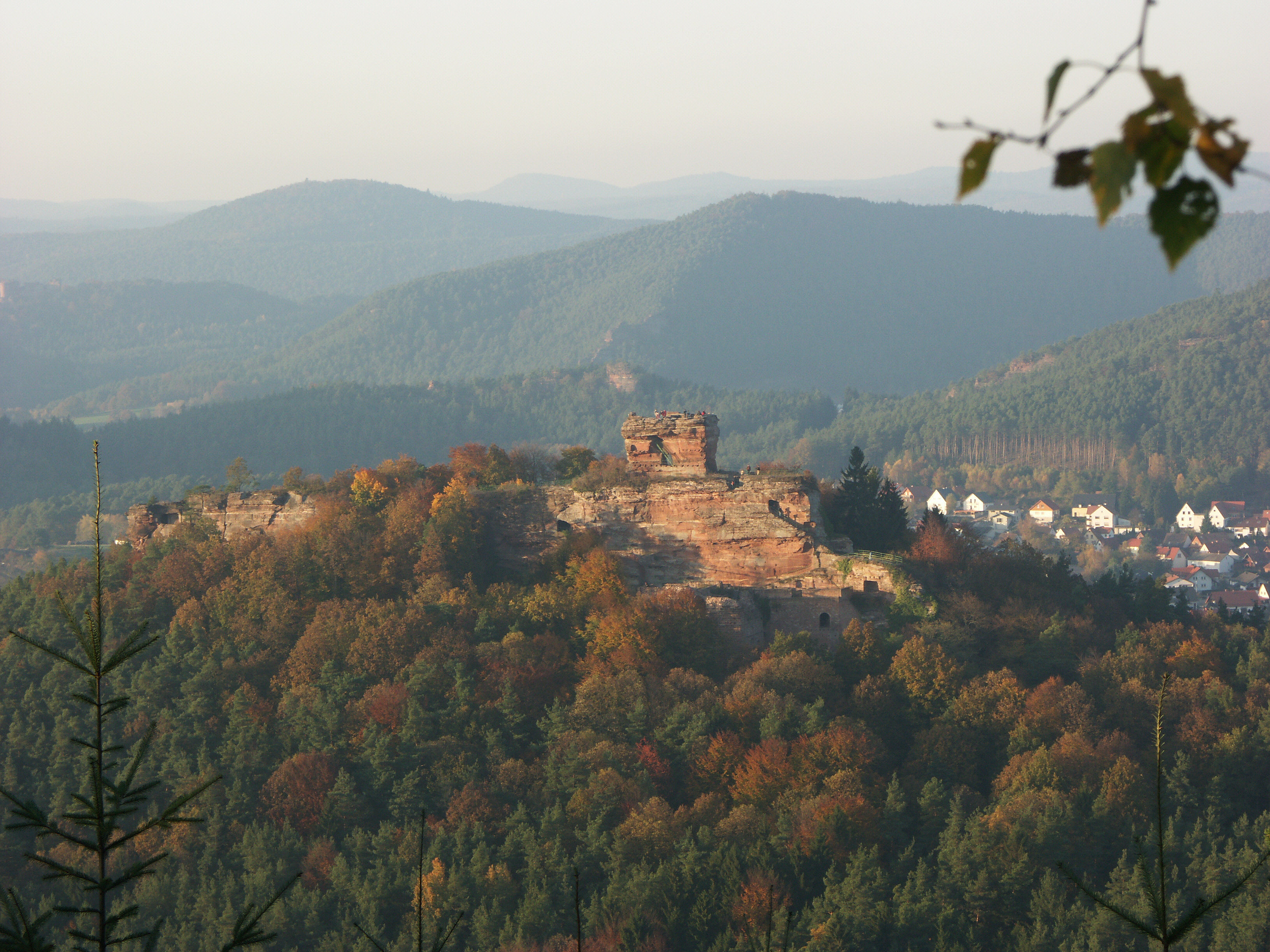 Burgruine Drachenfels bei Busenberg im Pfälzer Wald.